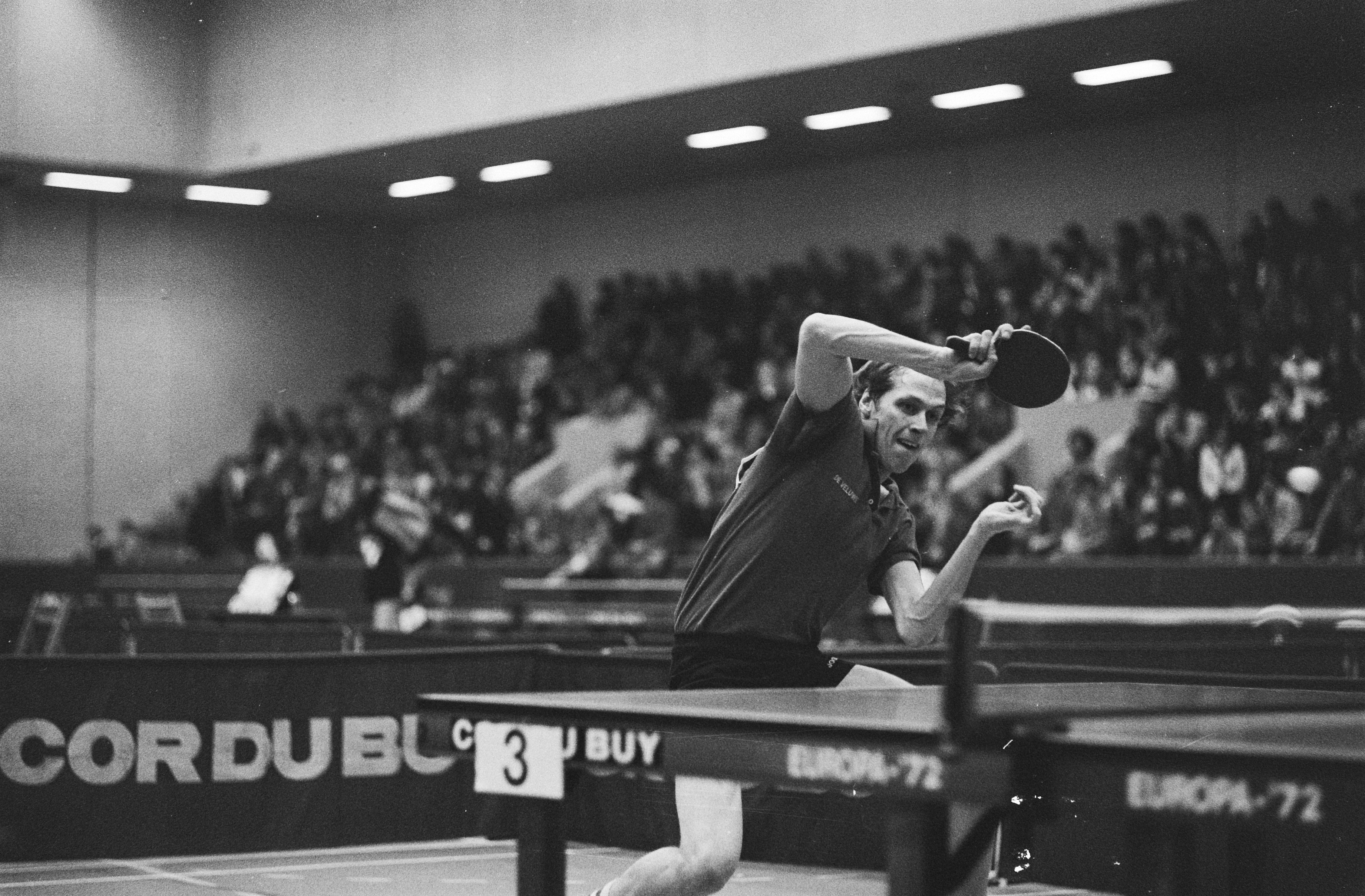 Collectie / Archief : Fotocollectie Anefo Reportage / Serie : [ onbekend ] Beschrijving : Nederlandse kampioenschappen tafeltennis in Utrecht, Van Spanje in aktie. Mogelijk Jaap van Spanje die de finale haalde (broer Ron van Spanje werd al vroeg in het kampioenschap uitgeschakeld). Datum : 15 maart 1981 Locatie : Utrecht Trefwoorden : TAFELTENNIS Fotograaf : Croes, Rob C. / Anefo Auteursrechthebbende : Nationaal Archief Materiaalsoort : Negatief (zwart/wit) Nummer archiefinventaris : bekijk toegang 2.24.01.05 Bestanddeelnummer : 931-3750